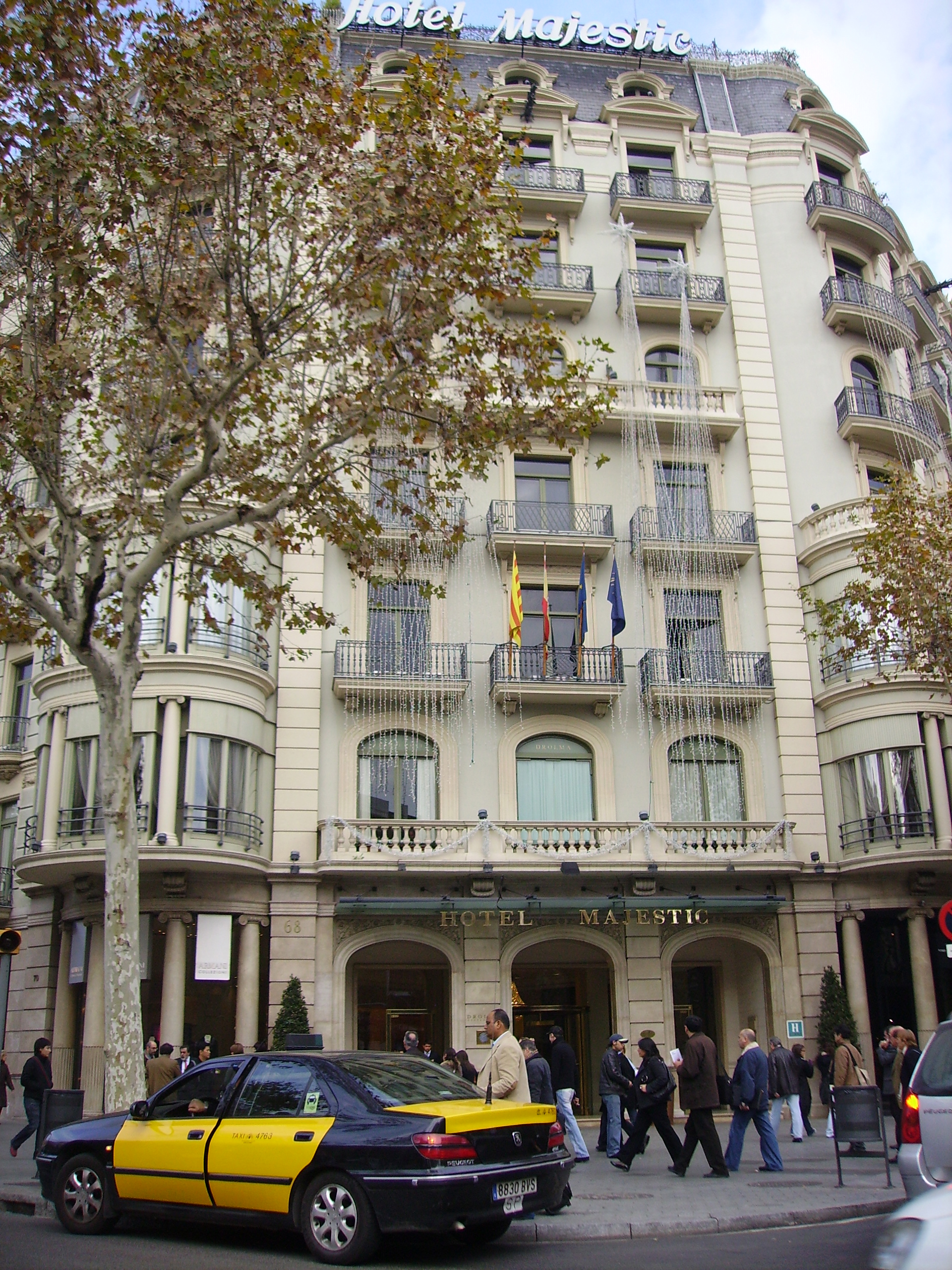 Hotel Majestic (Barcelona, Catalunya).